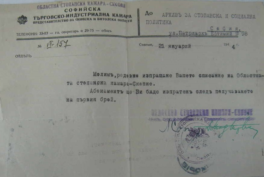 Документ на Скопската областна търговско-индустриална камара